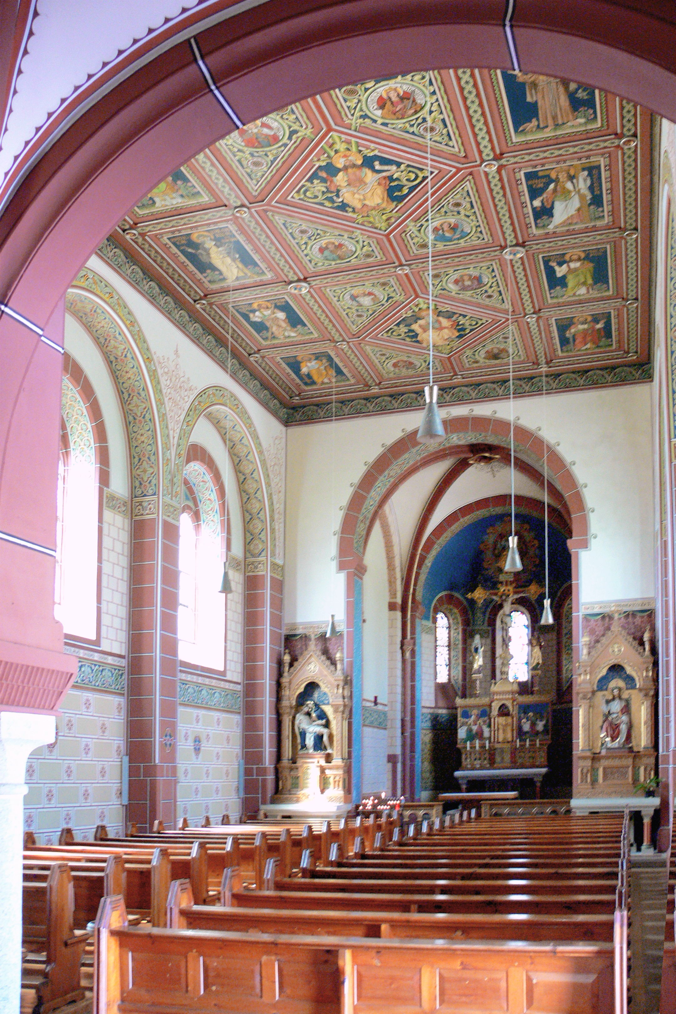 Wallfahrtskirche Maria Witterschnee (Schneekreuz), Löffingen Blick von der Eingangszone unter der Empore zum Chor; Altäre von Franz Josef Simmler; Decke von August von Wörndle